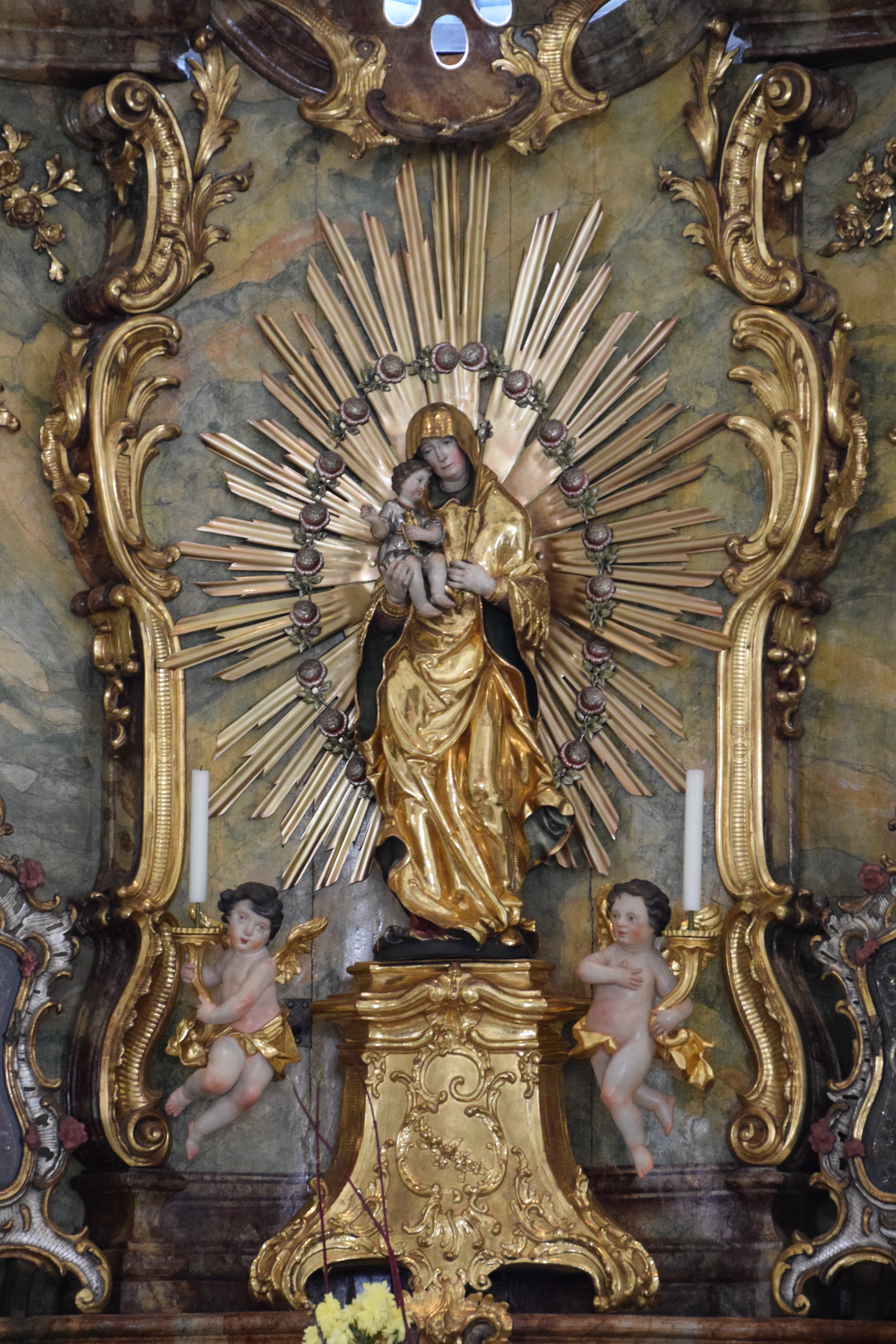 Südlicher Seitenaltar der Stiftspfarrkirche St. Kassian in Regensburg